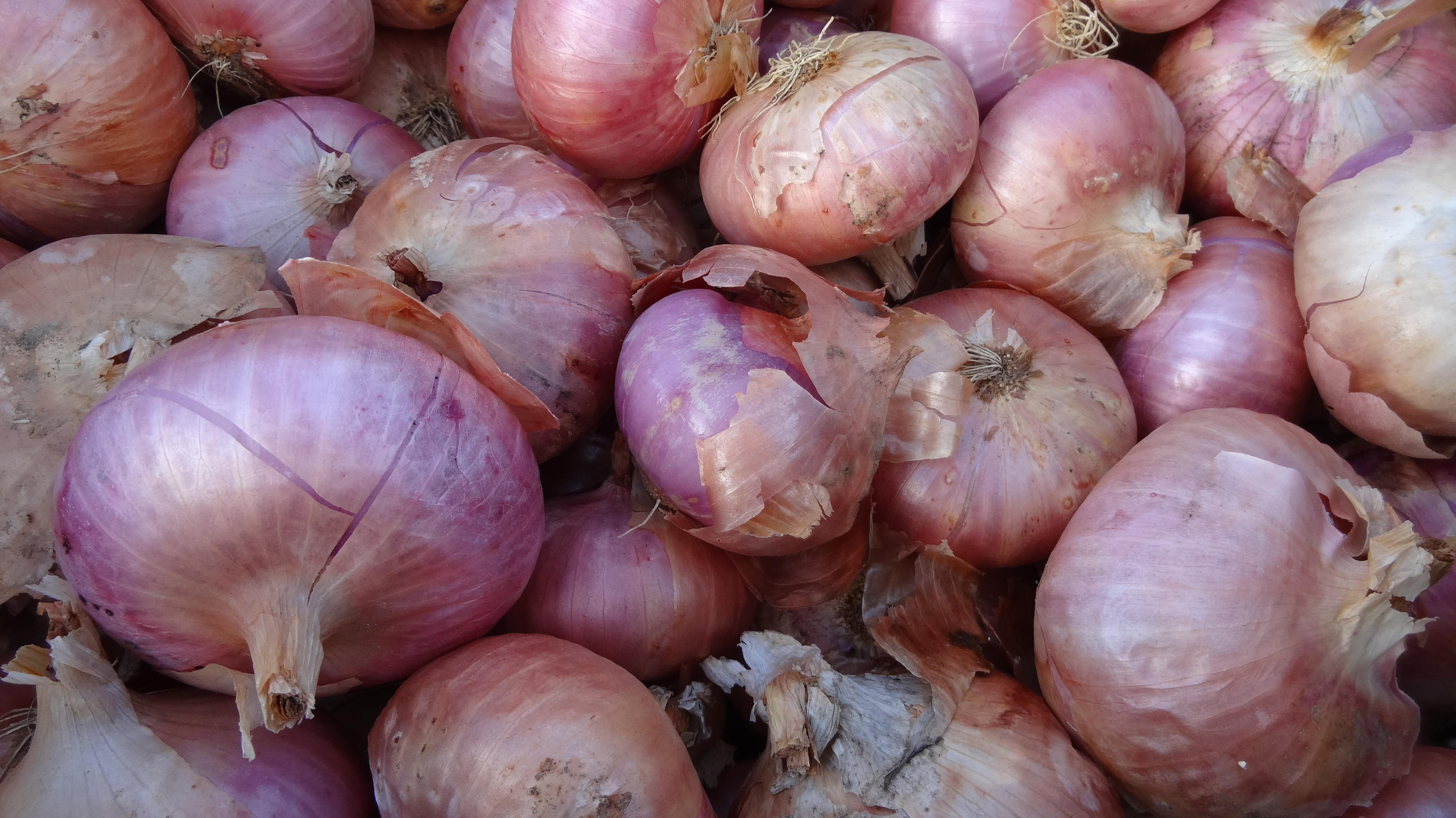 Ceba de figueres de la finca Can Bosc del Baró. Varietat de ceba típica de l'Empordà caracteritzada per la forma una mica aplanada, lleuger color lilós i gust dolç